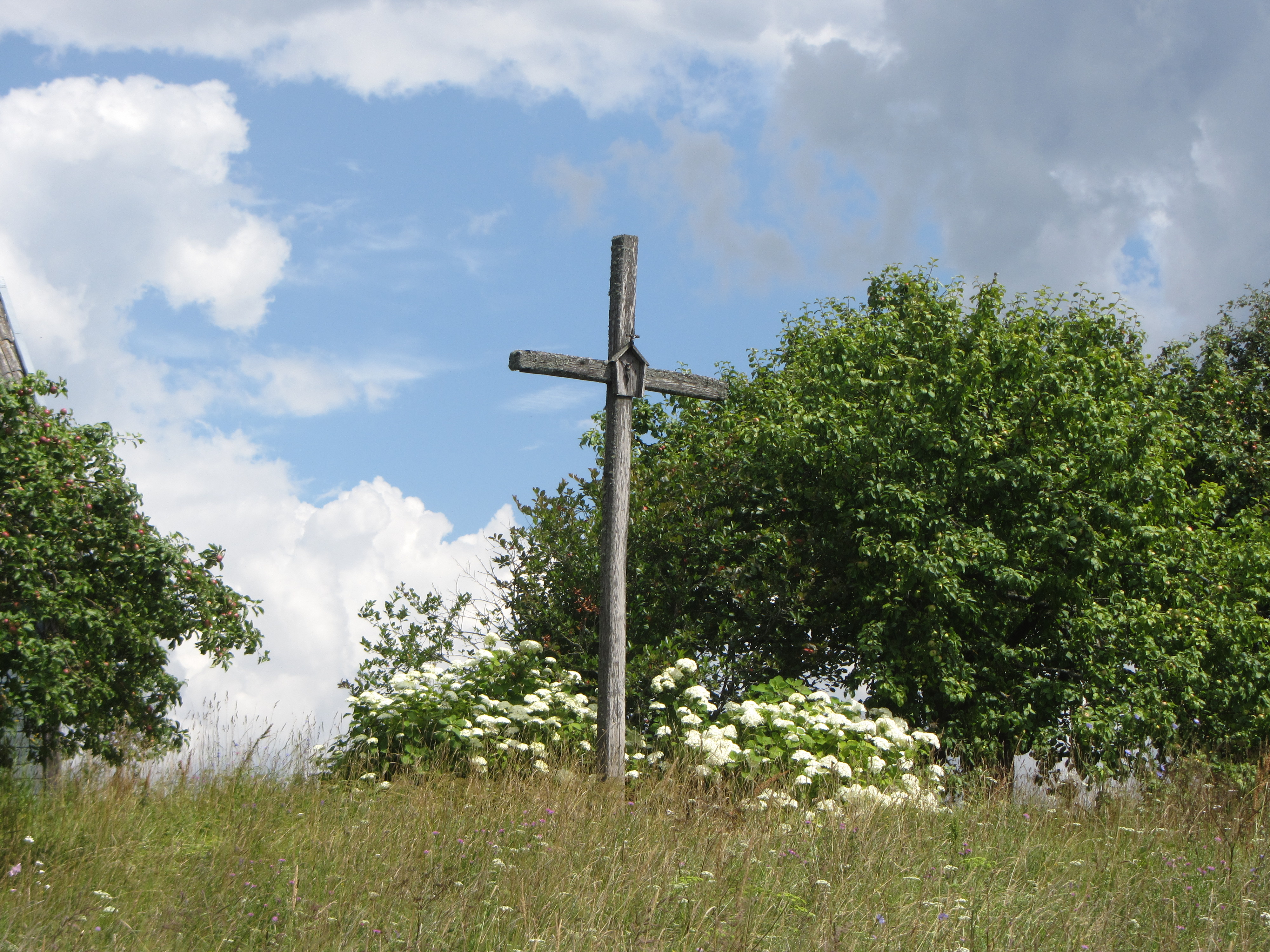 Degučių sen., Lithuania